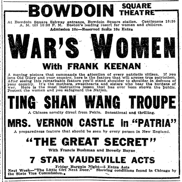 Advertisement, Boston, Massachusetts, USA